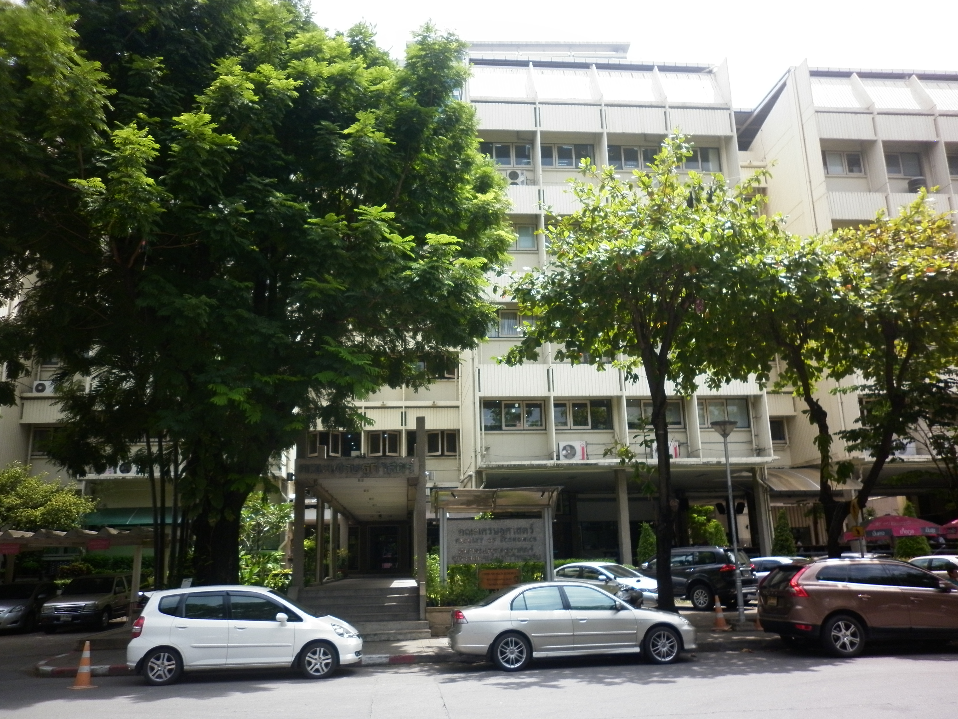 Volkswirtschaftliche Fakultät der Chulalongkorn Universität